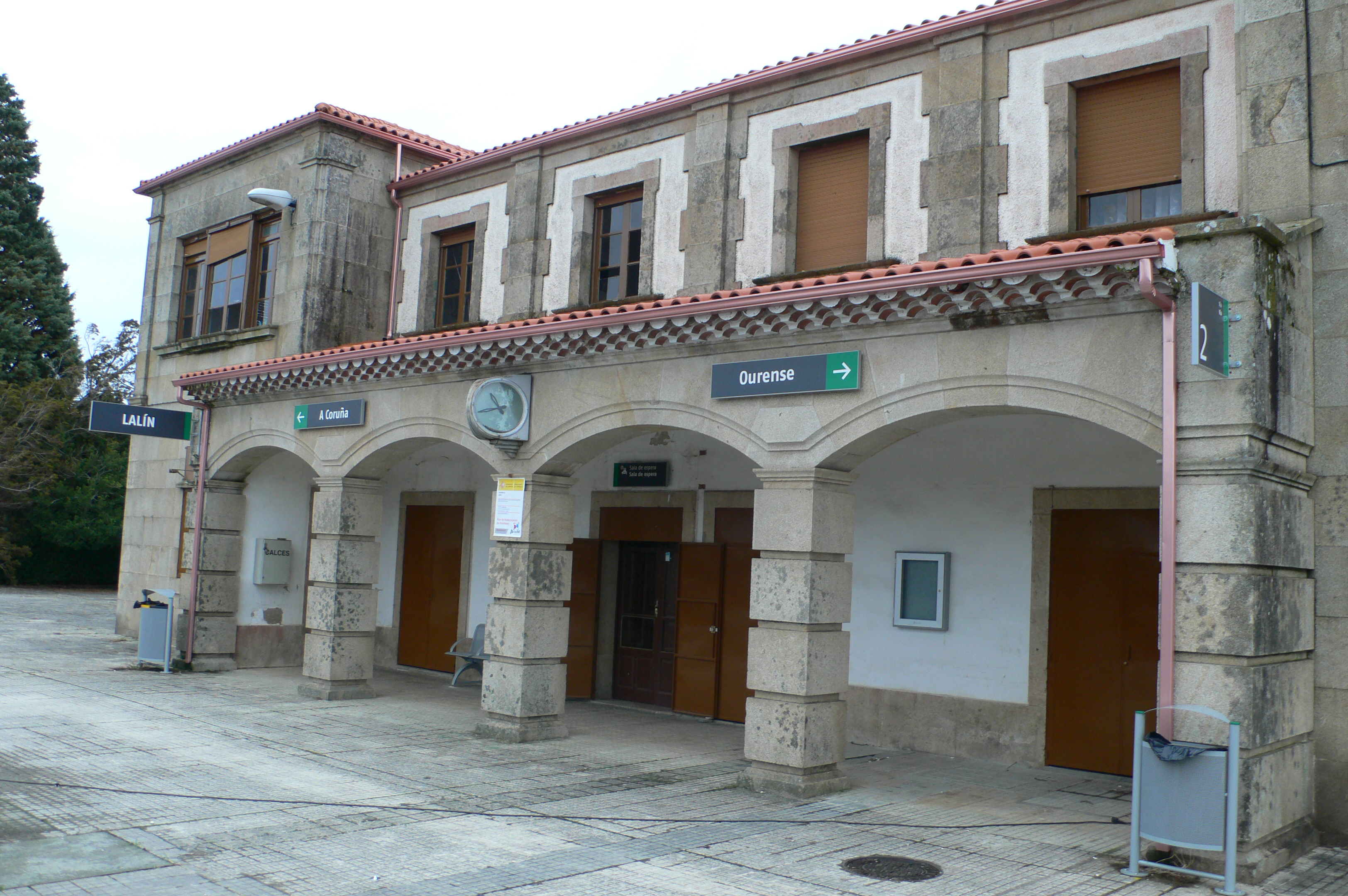 Vista de la estación desde los andenes